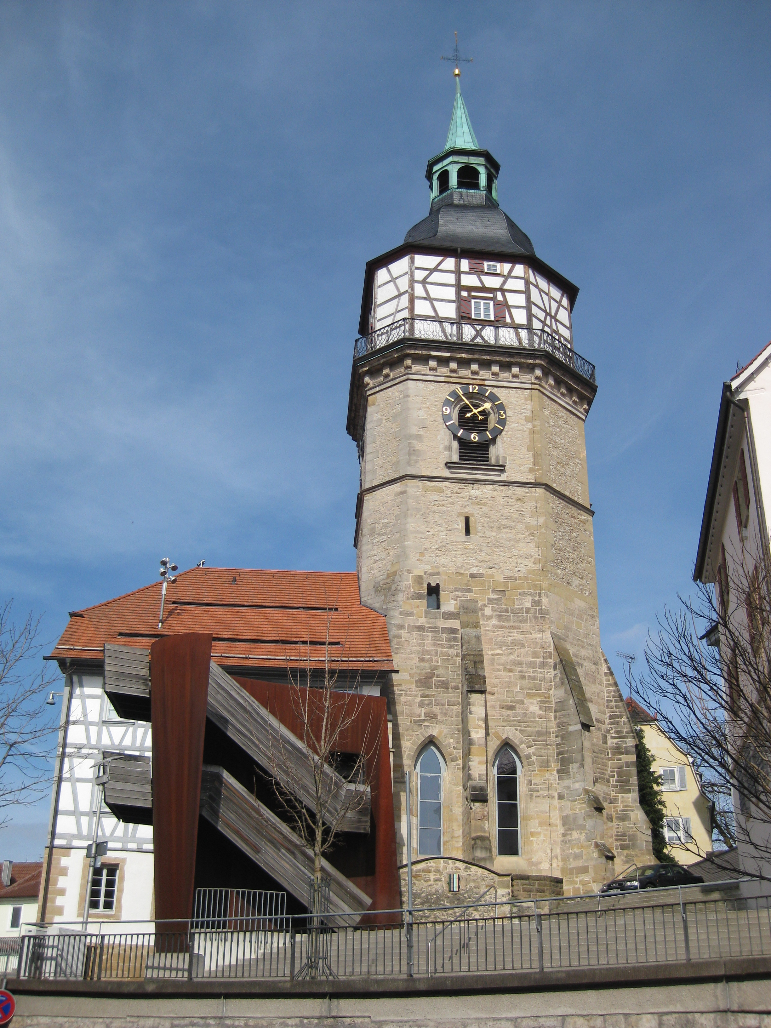 Backnang Stadtturm